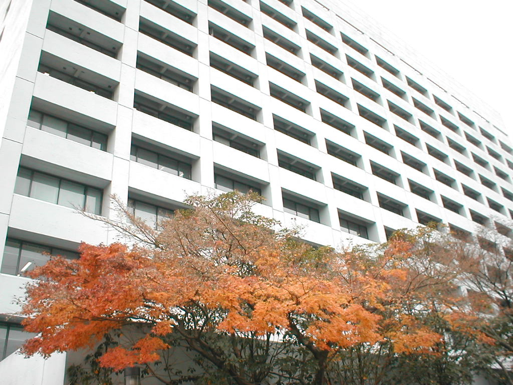 中央大学八王子キャンパス2号館